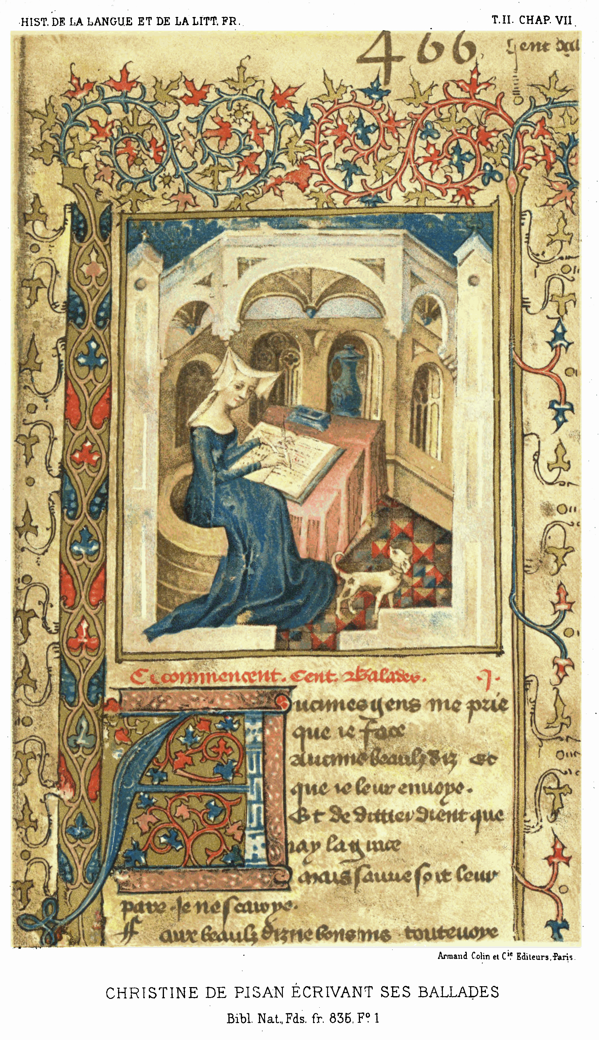 Christine de Pisan écrivant ses ballades